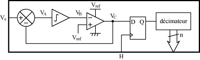 Schéma de principe d'un convertisseur delta-sigma